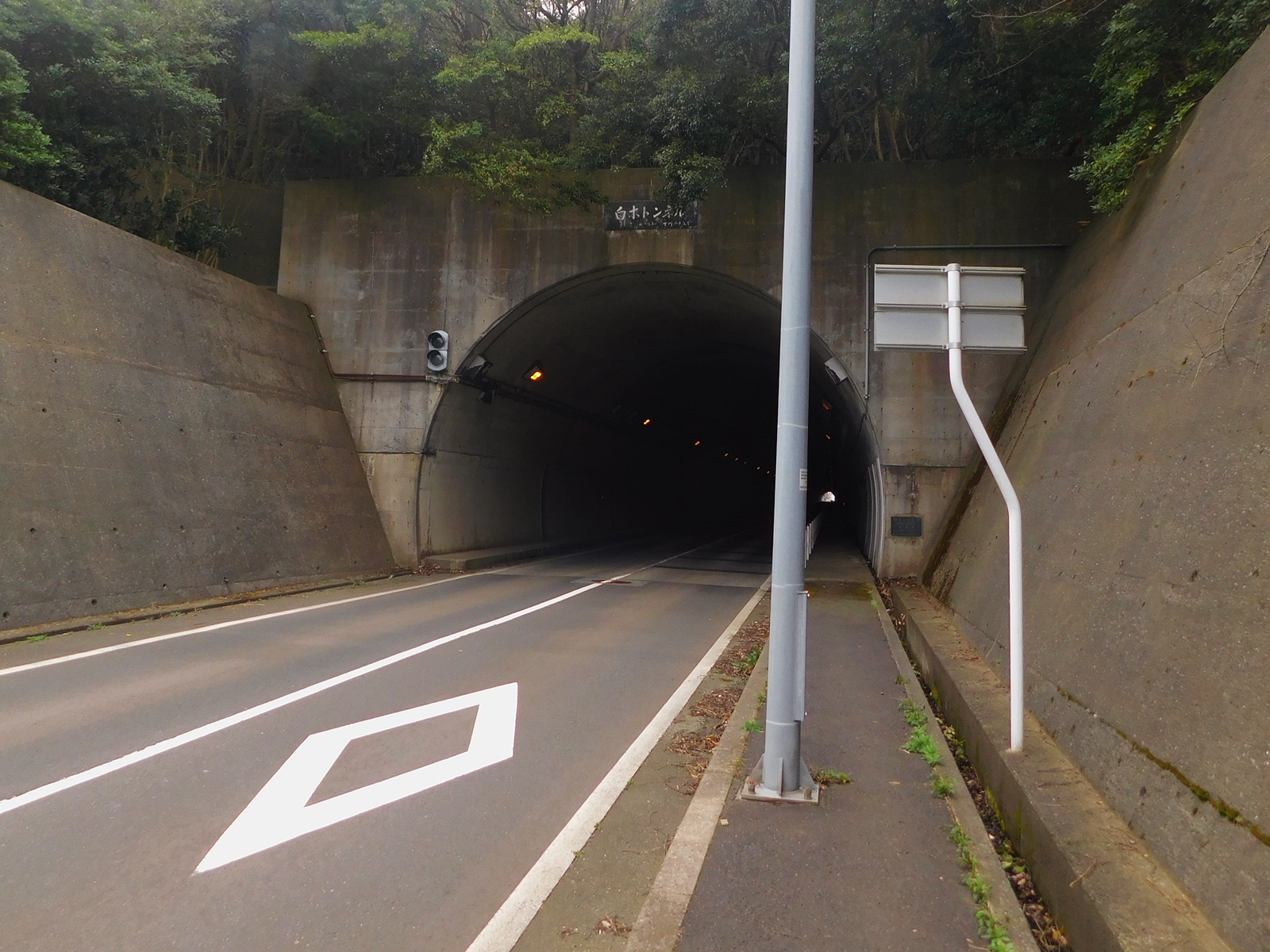 福井県道141号竹波立石縄間線の白木トンネル。